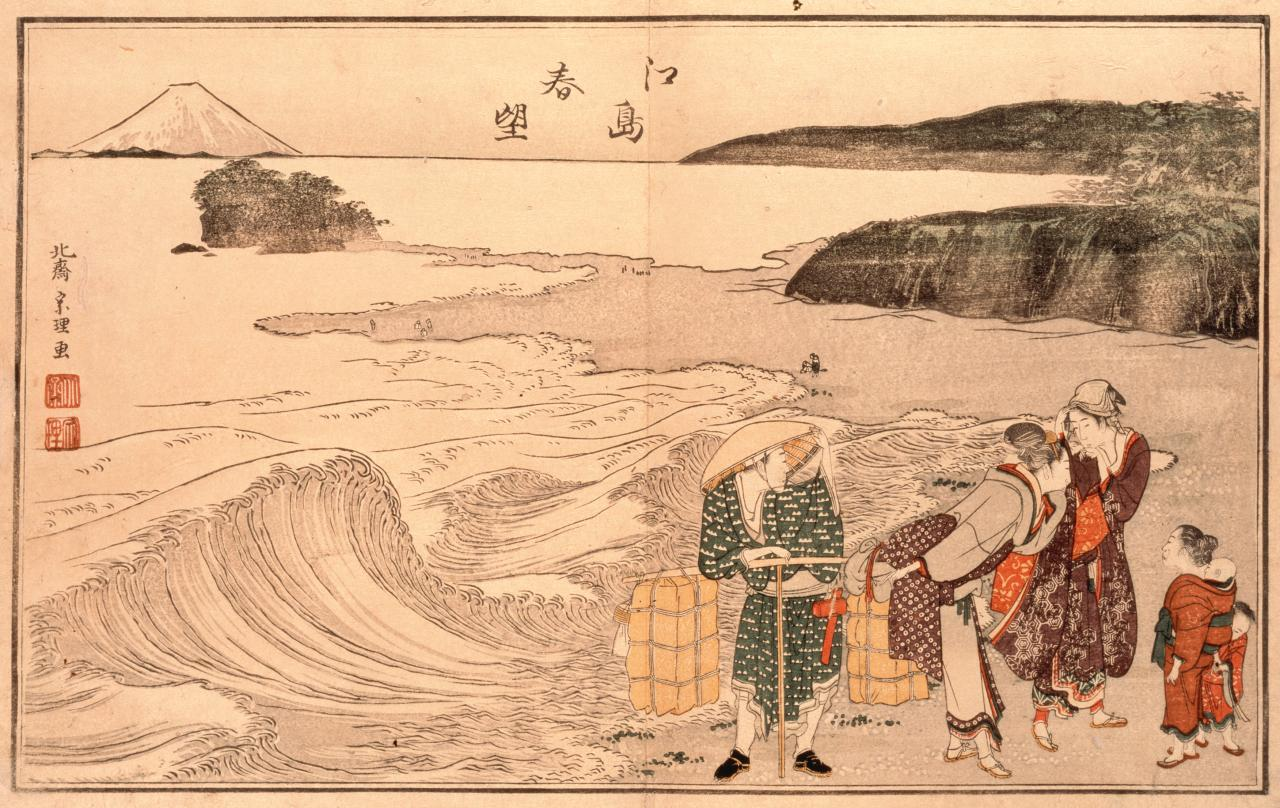 stampa a colori di Katsushika Hokusai